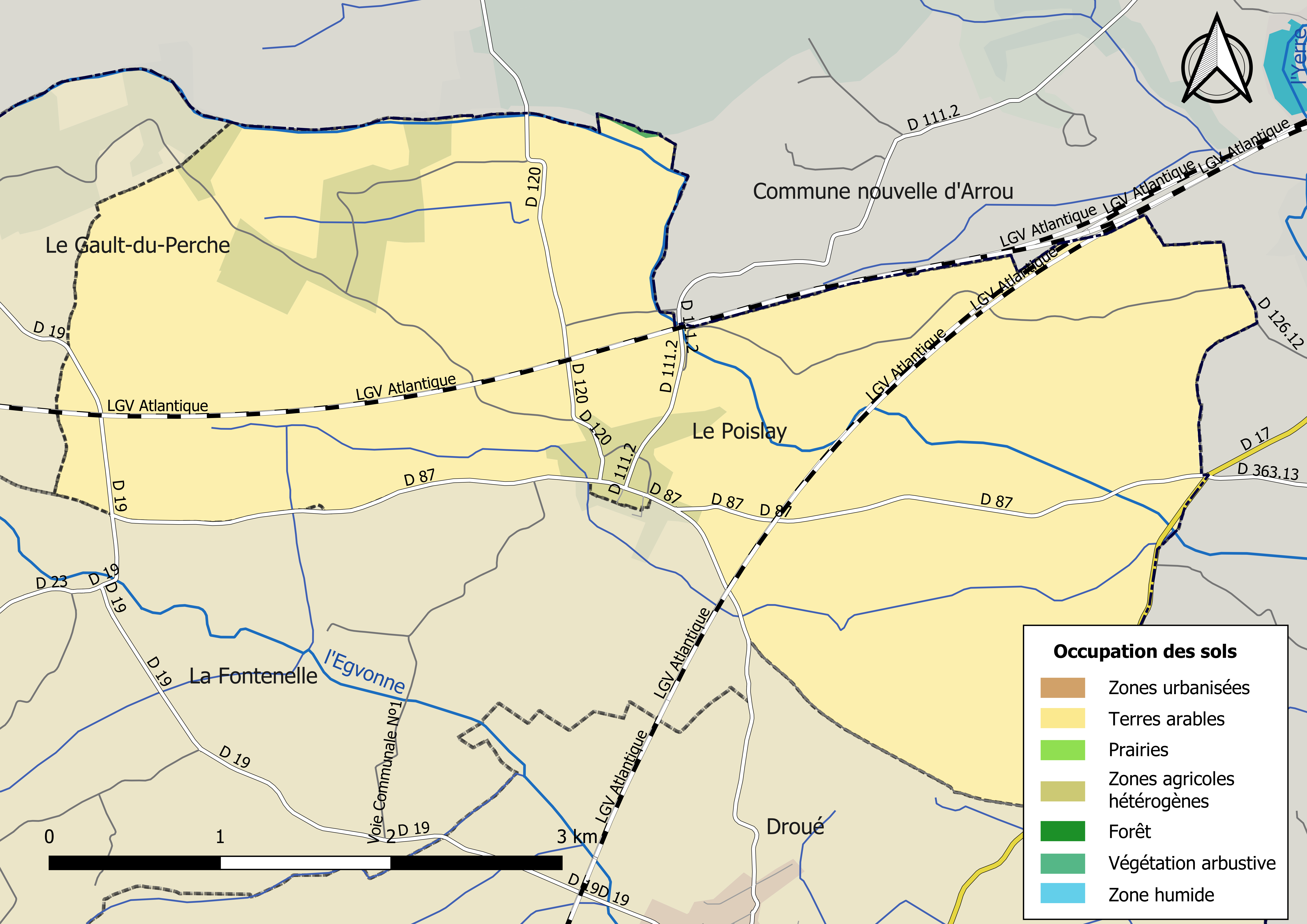 Carte des infrastructures et de l’occupation des sols en 2018 de la commune de Le Poislay (France).